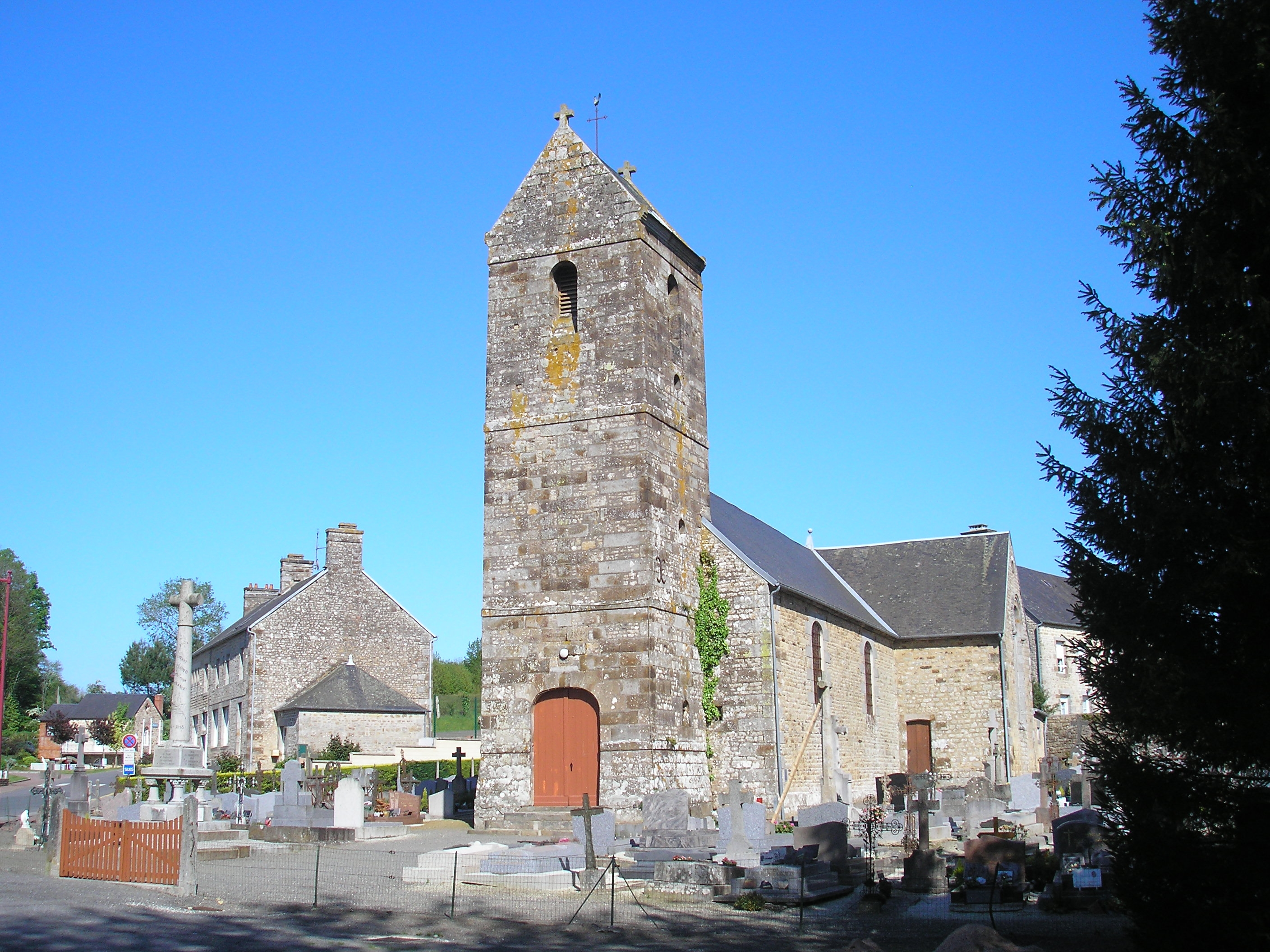 Plomb (Normandie, France). L'église Saint-Martin.